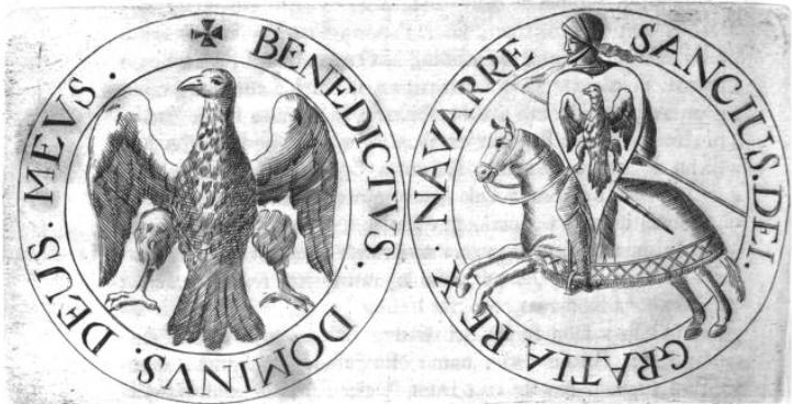 Sancho VII. Navarrský